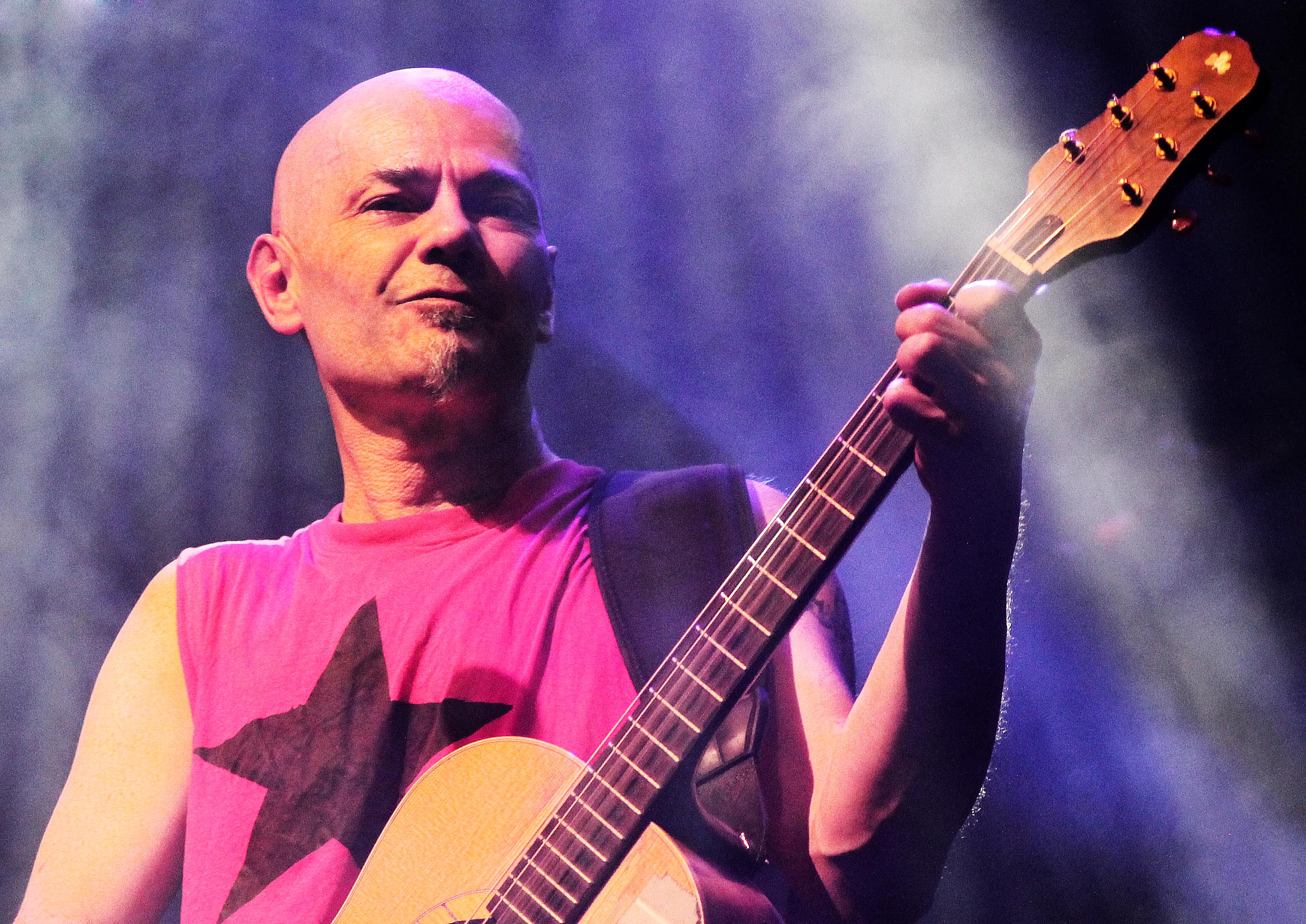 VII Festival Solidario Aspaym 2014